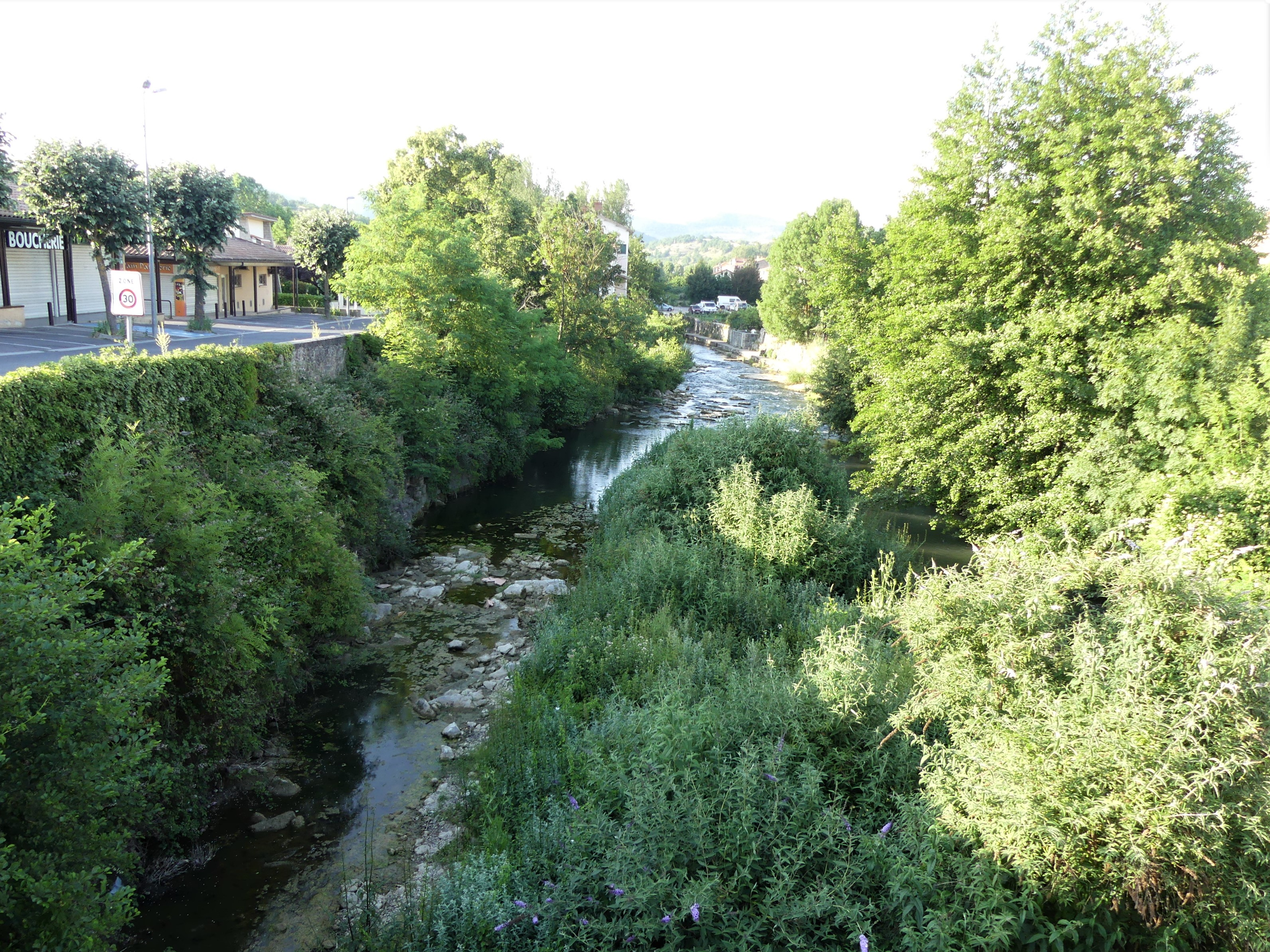 Le Cernon au pont de la route départementale 992, Saint-Georges-de-Luzençon, Aveyron, France. Vue prise en direction de l'aval.